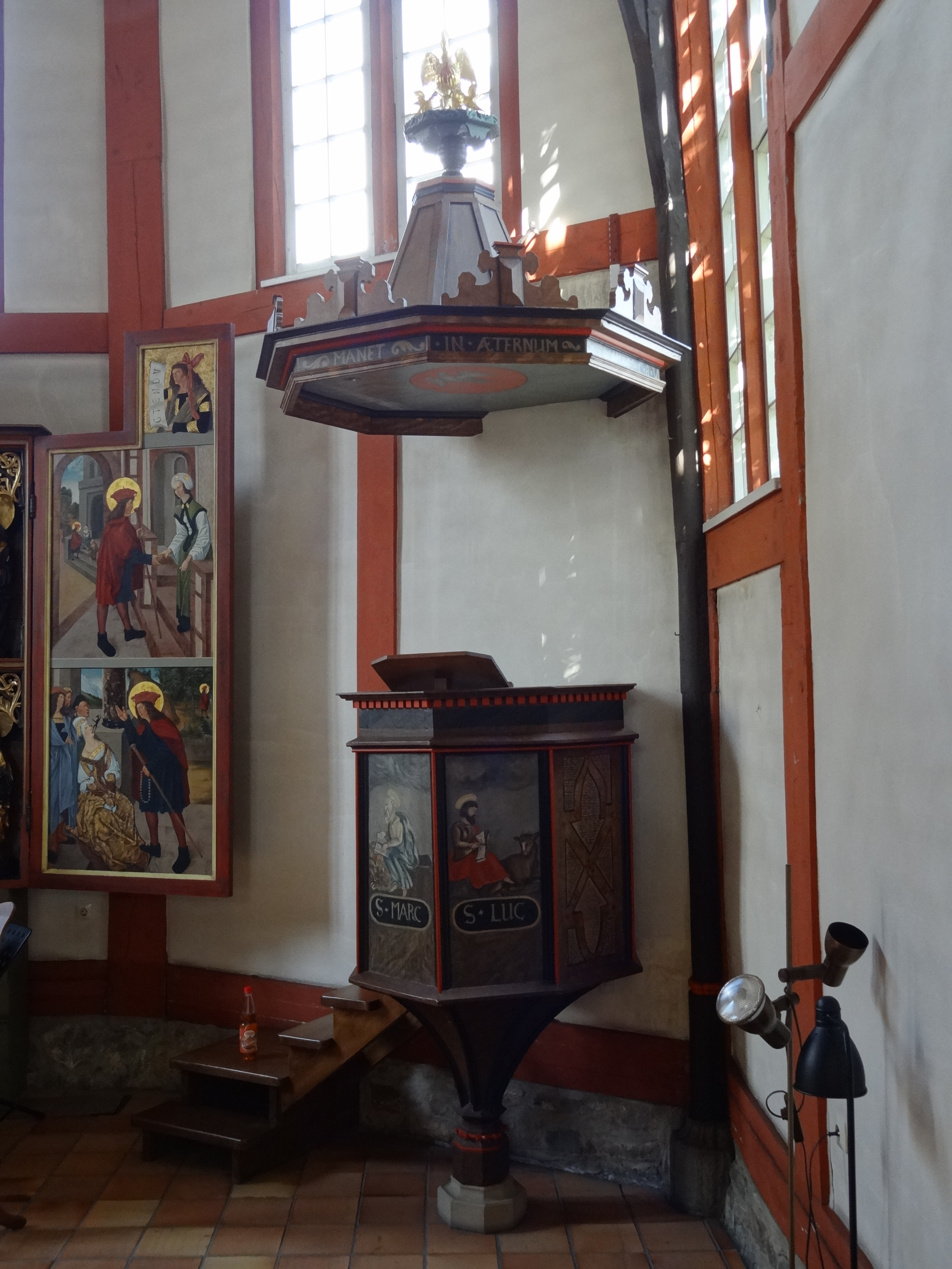 Ehemalige Hospitalkapelle St. Wendelin (Butzbach)